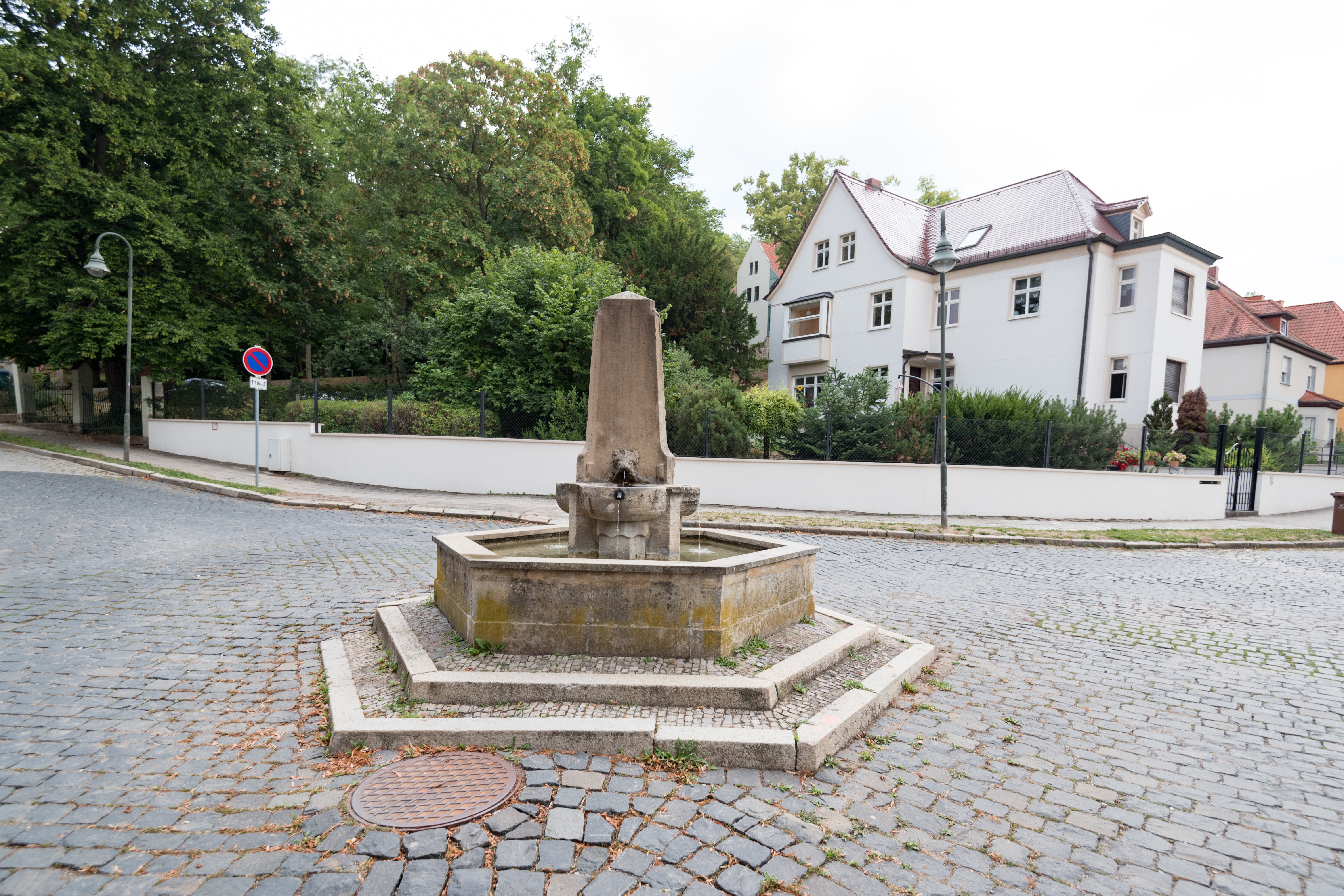 Naumburg (Saale), Bucholzstraße, Brunnen am südlichen Ende